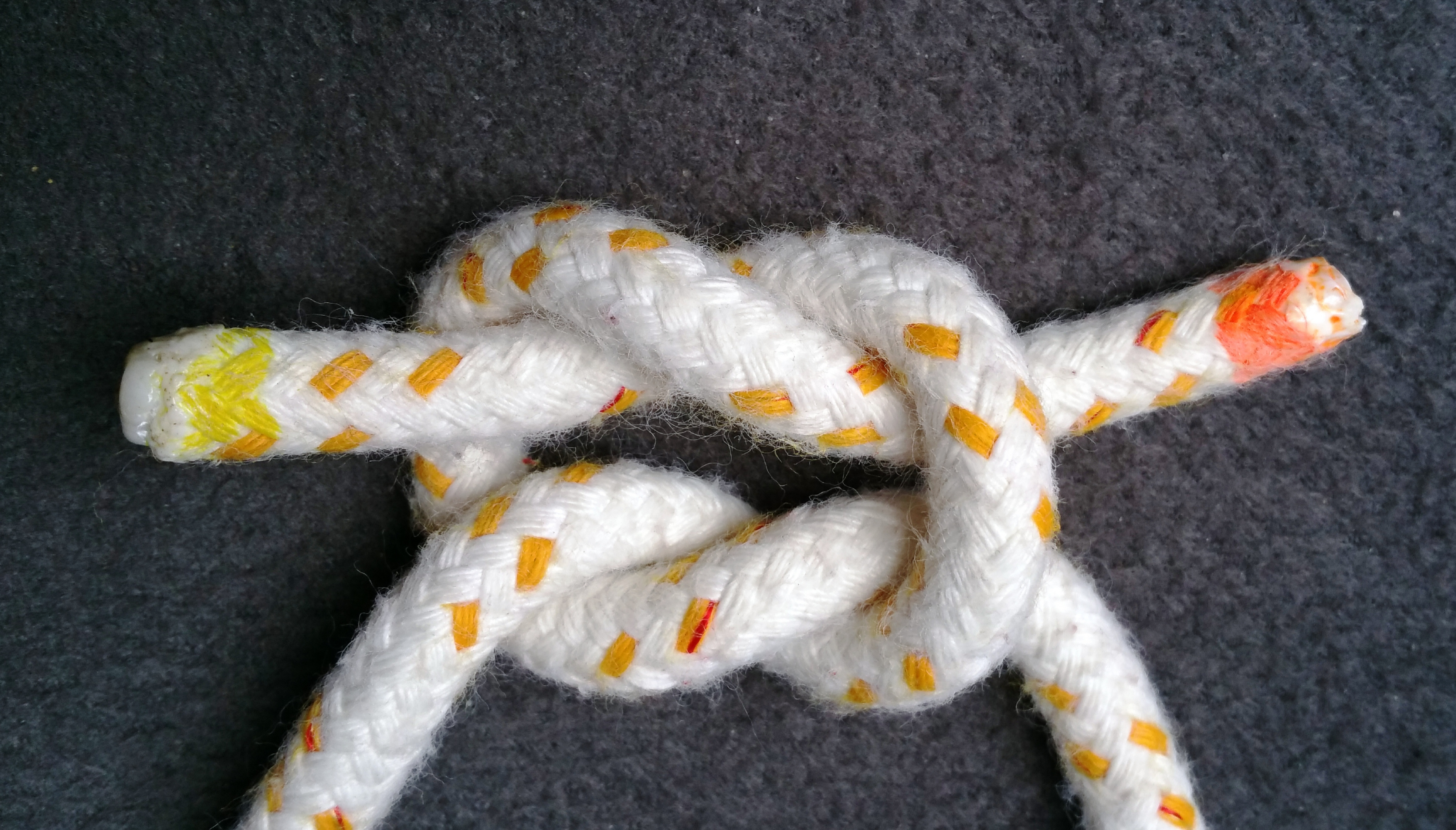 Kreuzknoten (zuerst rechts über links gelegter Halber Knoten und dann links über rechts gelegter Halbknoten